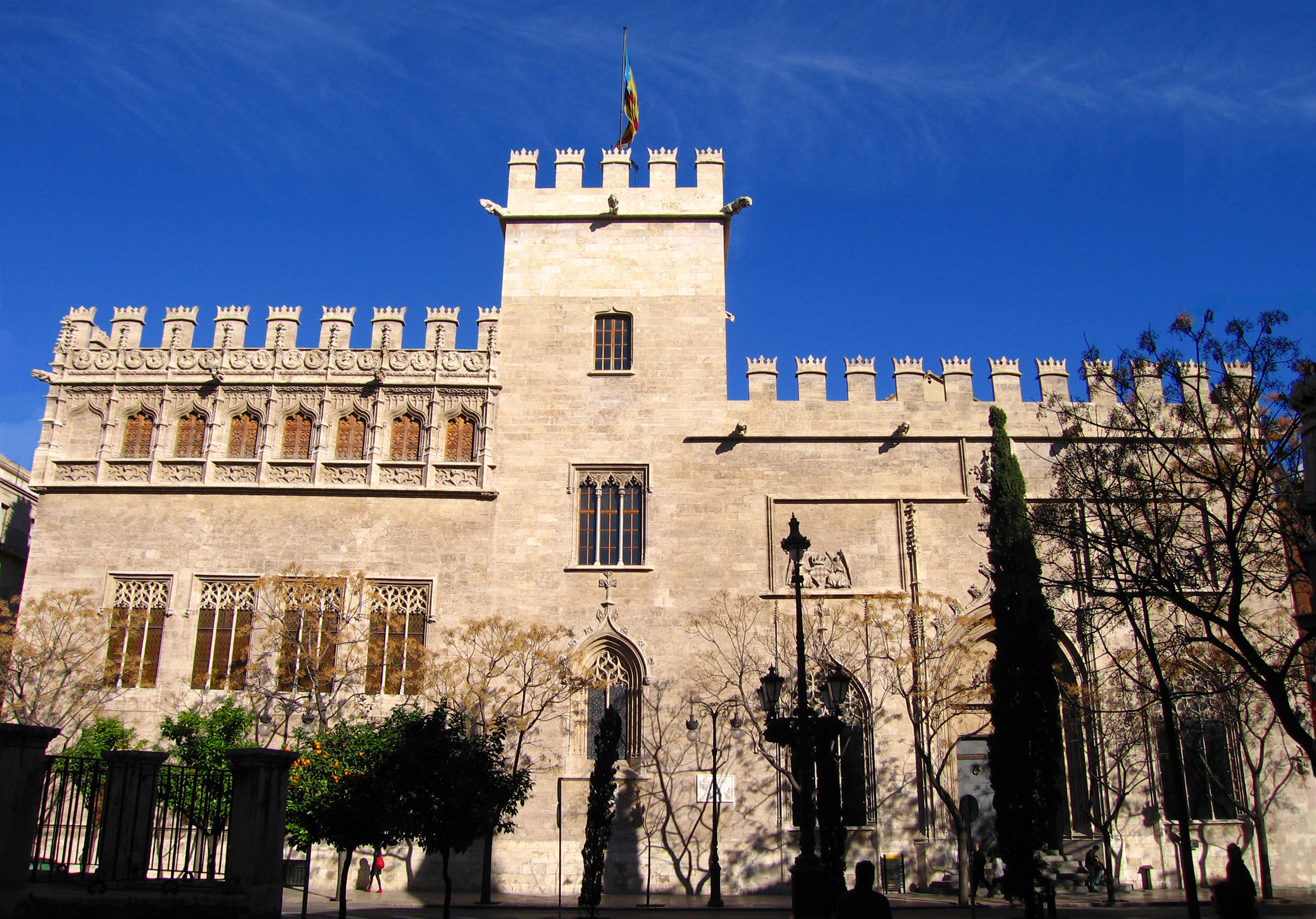 Llotja de la Seda (València).